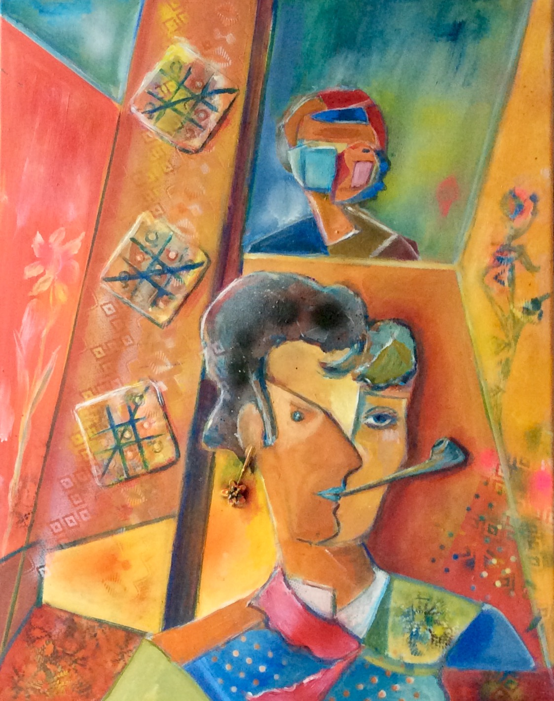 In samenwerking met het bureau gelijkebehandeling Lelystad. Het collectief kunstenaars uit de polder en een school. Exposeren wij in de Kubus te Lelystad met het Thema "Gender Blender". Te zien van af 10 april tot 19 Mei 2017